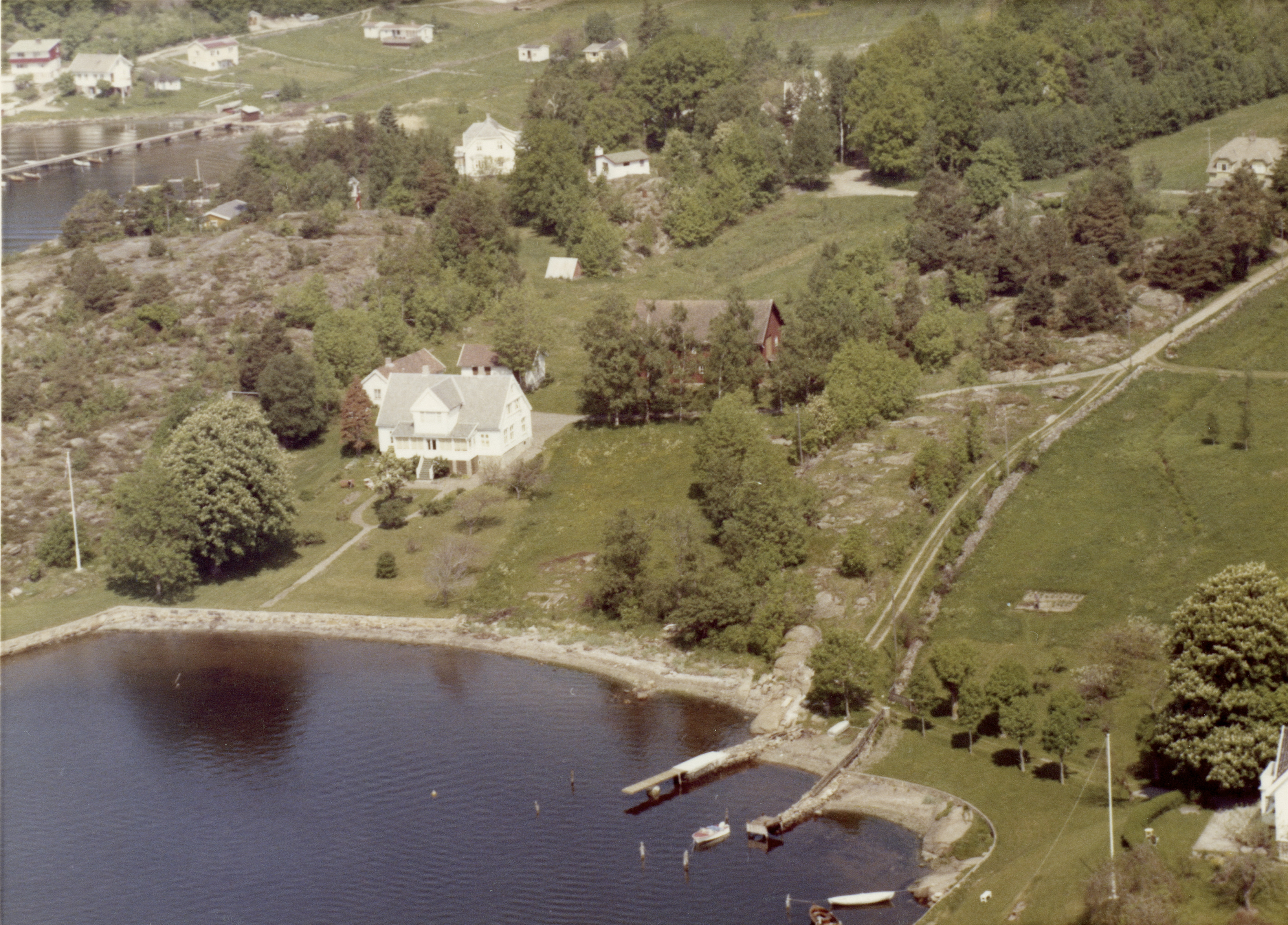 WF.S.164437 Gården Movik vestre gnr/bnr 69/1 Buerstad i bakgrunnen